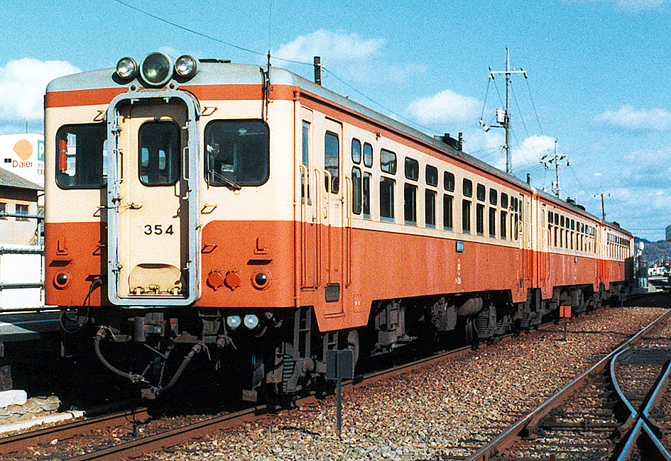 水島臨海鉄道キハ354（水島駅、地上駅時代）